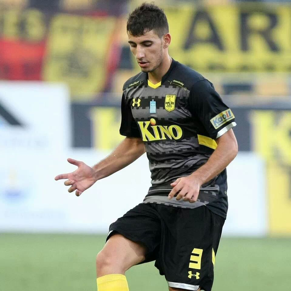 Arisfc